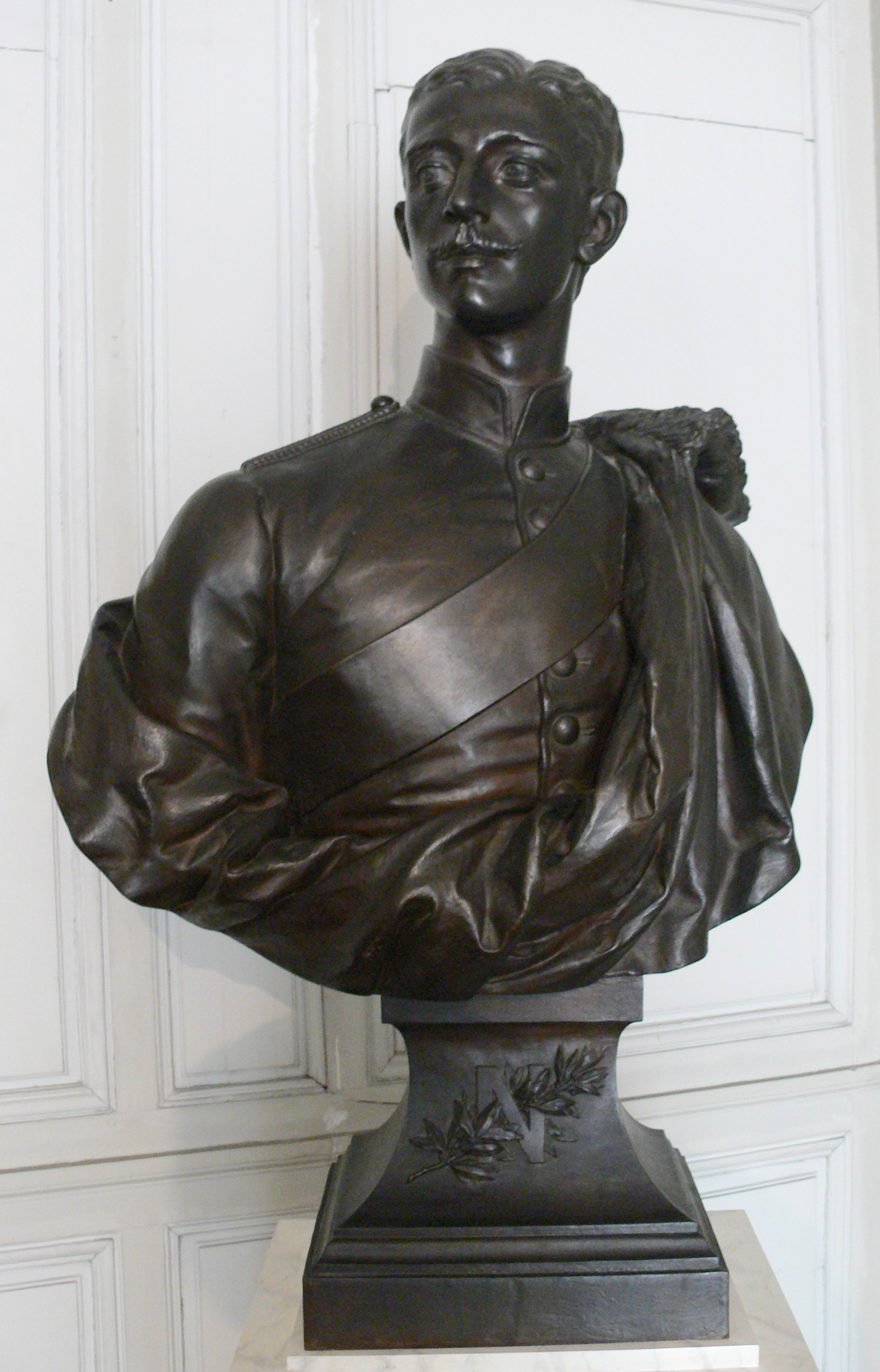 Compiègne, France: Château de Compiègne; Musée du Second Empire: Portrait en buste de Napoléon Eugène, le prince impérial